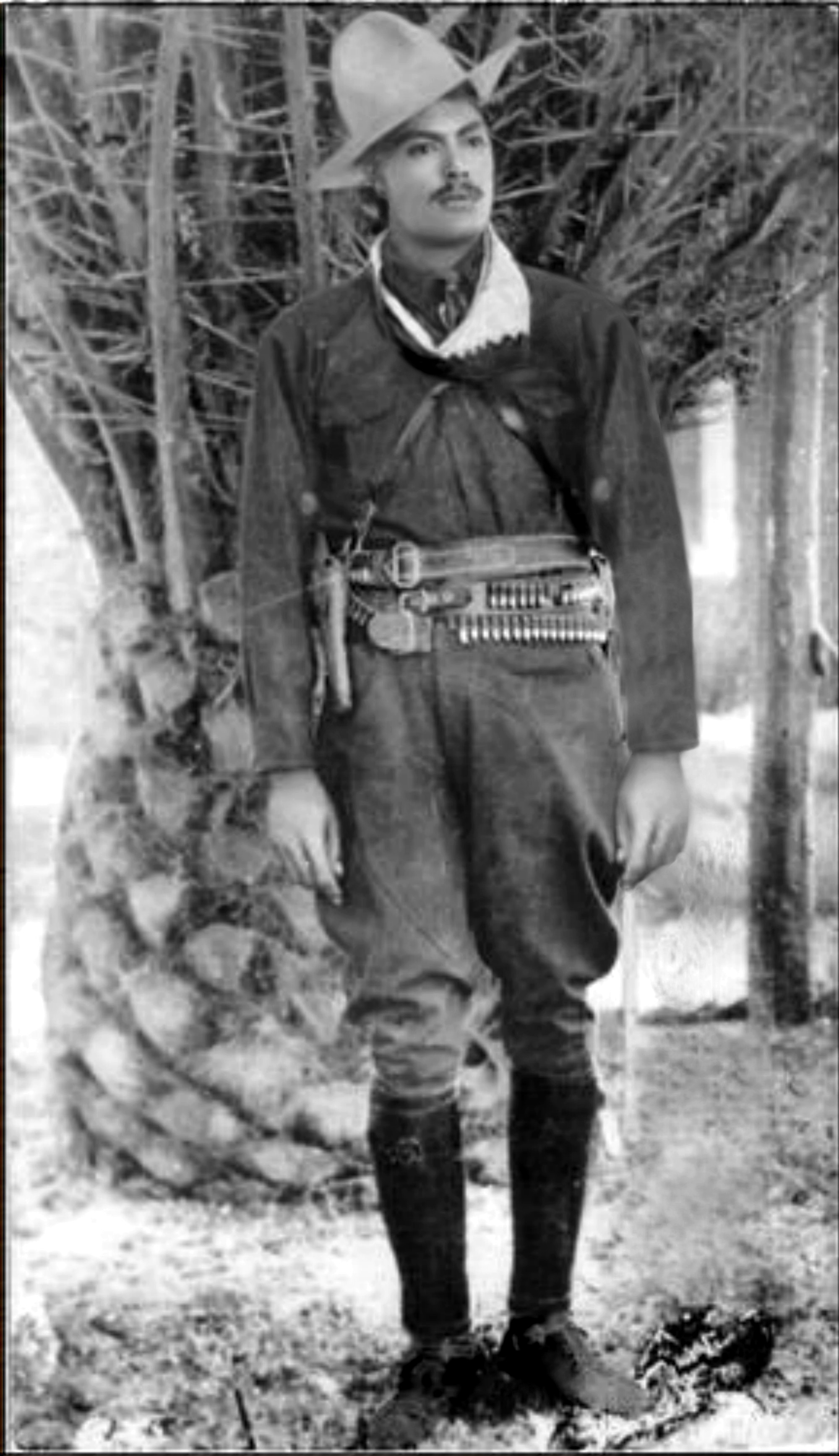 General Felix U. Gómez